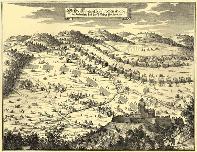 The camp of Szendrő (1664). Szendrői magyar tábor, 1664- A kép alján: Georg(ius) Szicha Delín(eavit) et com(m)unicavit. Caspar Merian fecit. A Lanfranconi-gyűjteménynek az országos képtárban levő példányáról